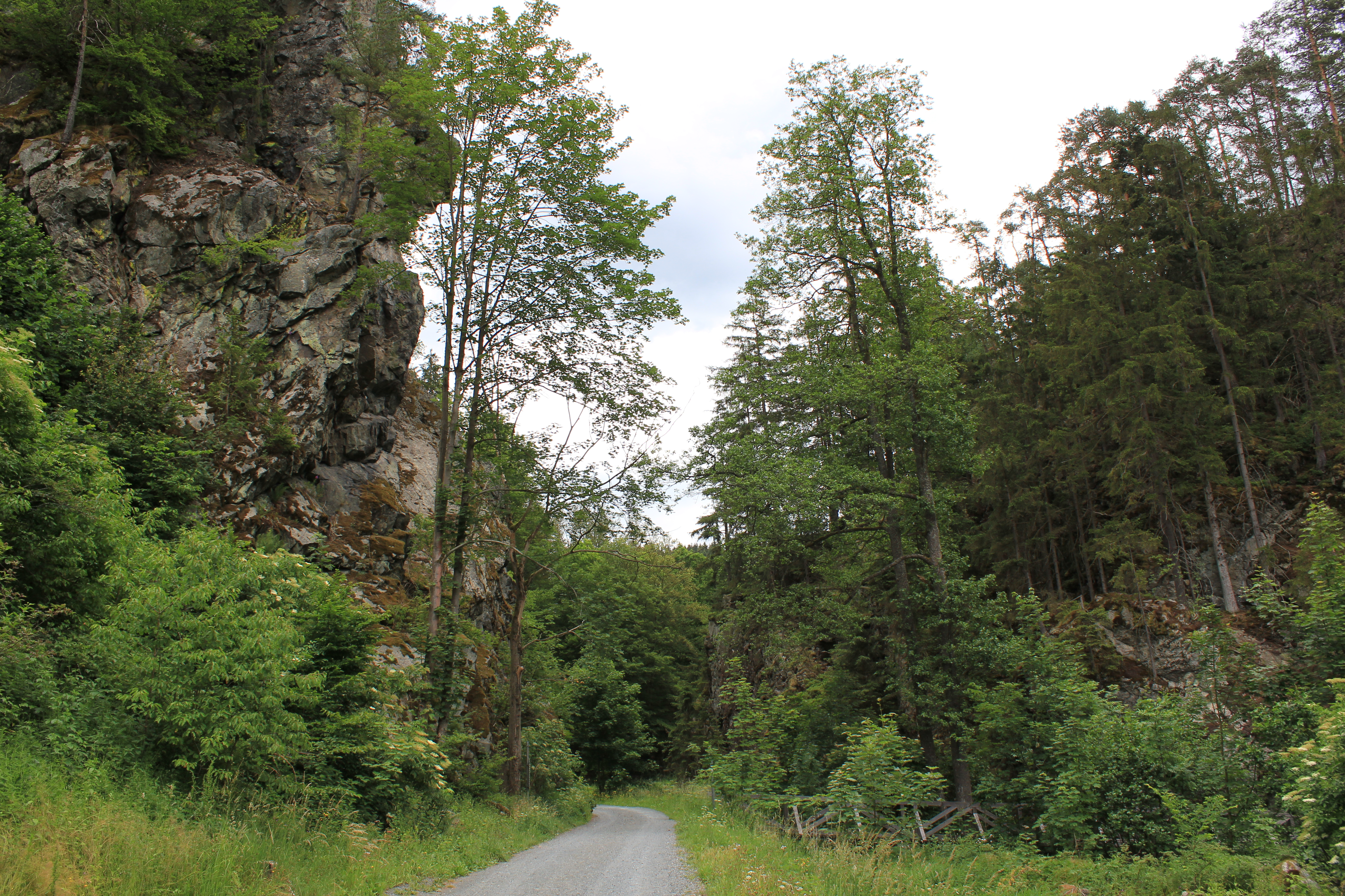 Blick auf die Felsen der Steinachklamm aus östlicher Richtung